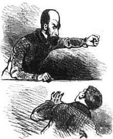 Caricature d'Armand Barbès à l'Assemblée constituante en 1848, par Cham.